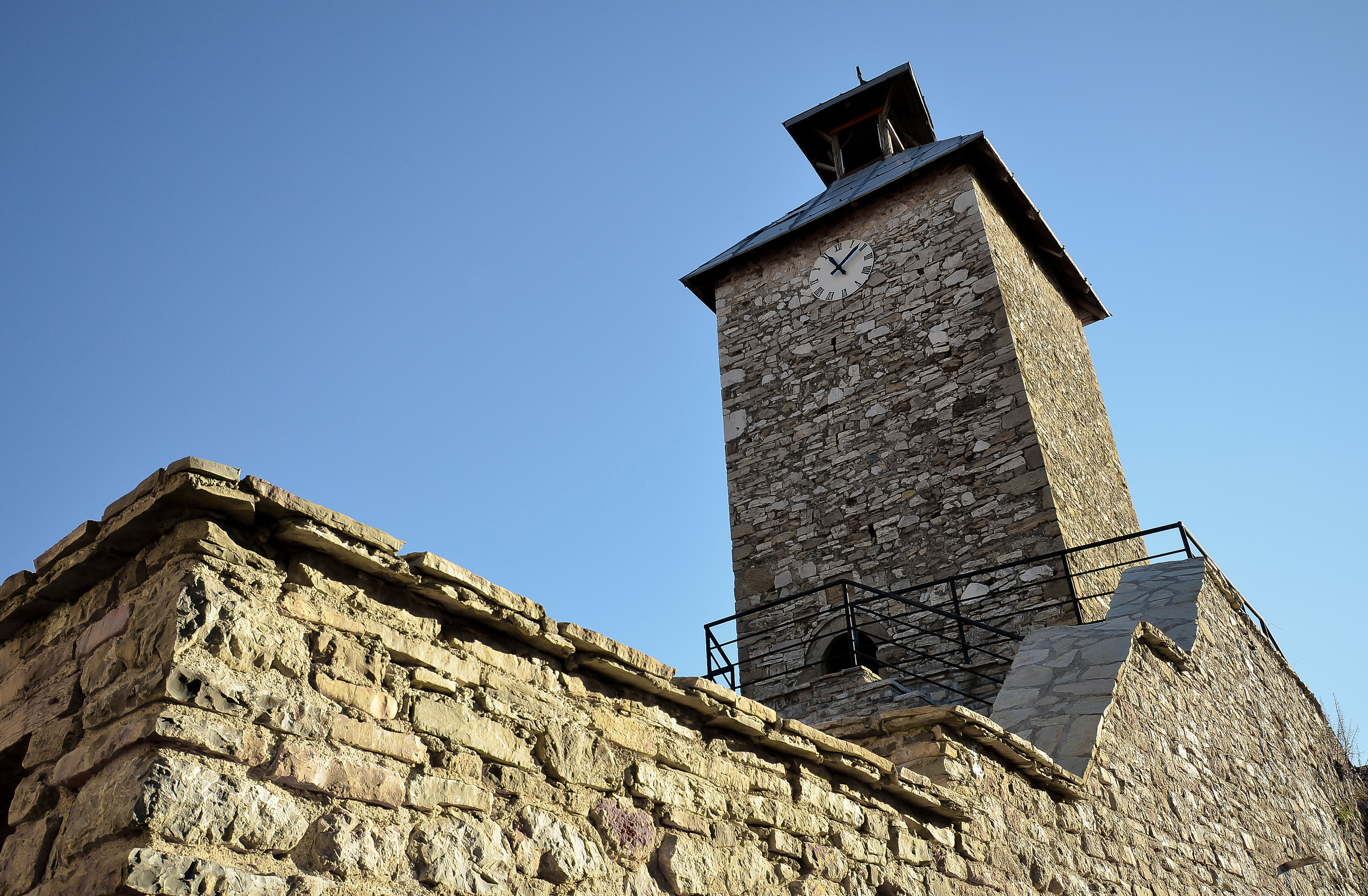 Kulla e Sahatit